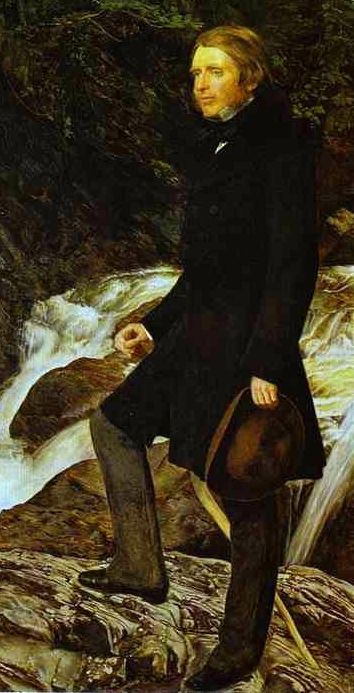 John Ruskin (detail of Image:Millais_Ruskin.jpg)